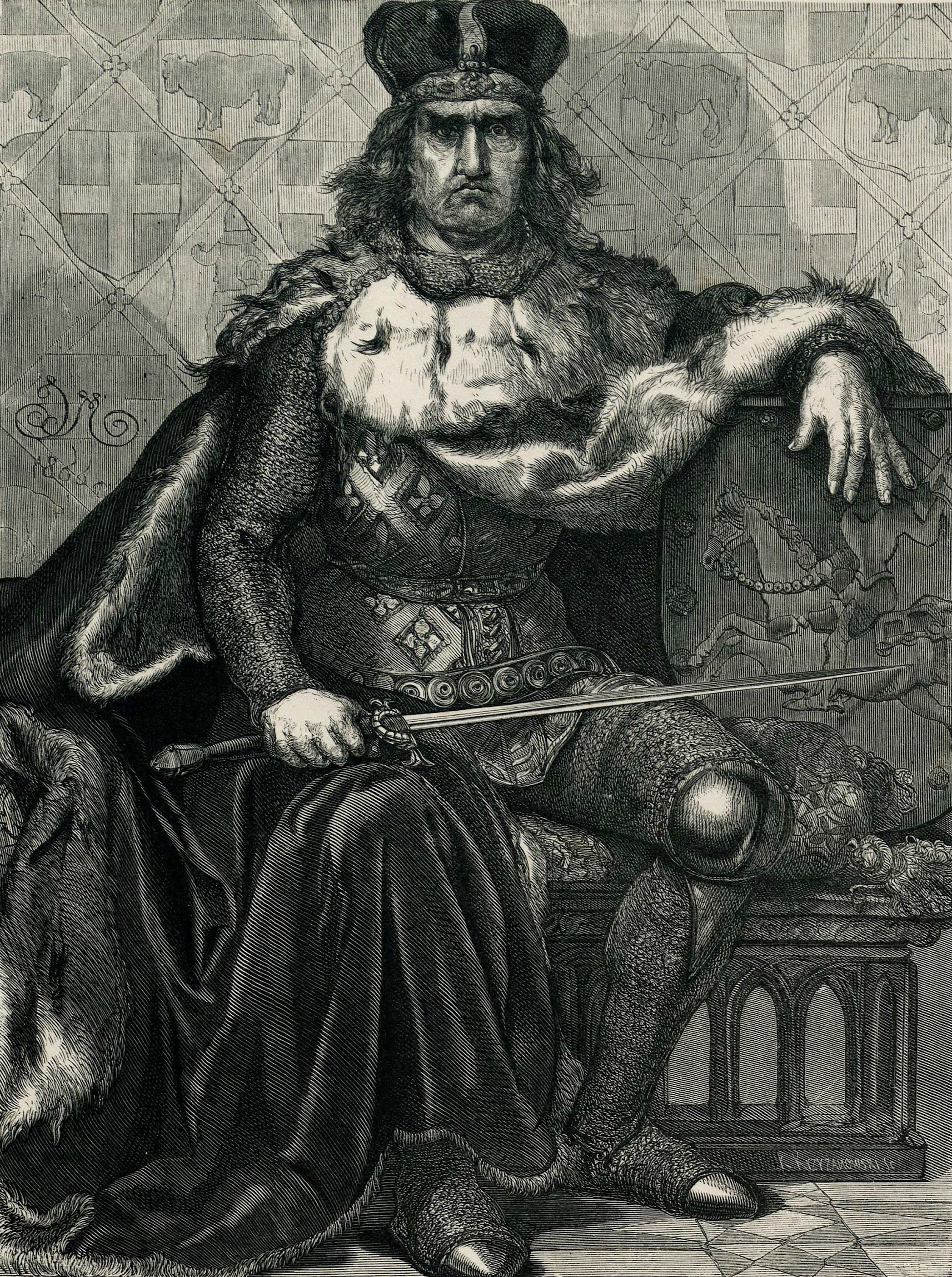 Wielki książę litewski Witold